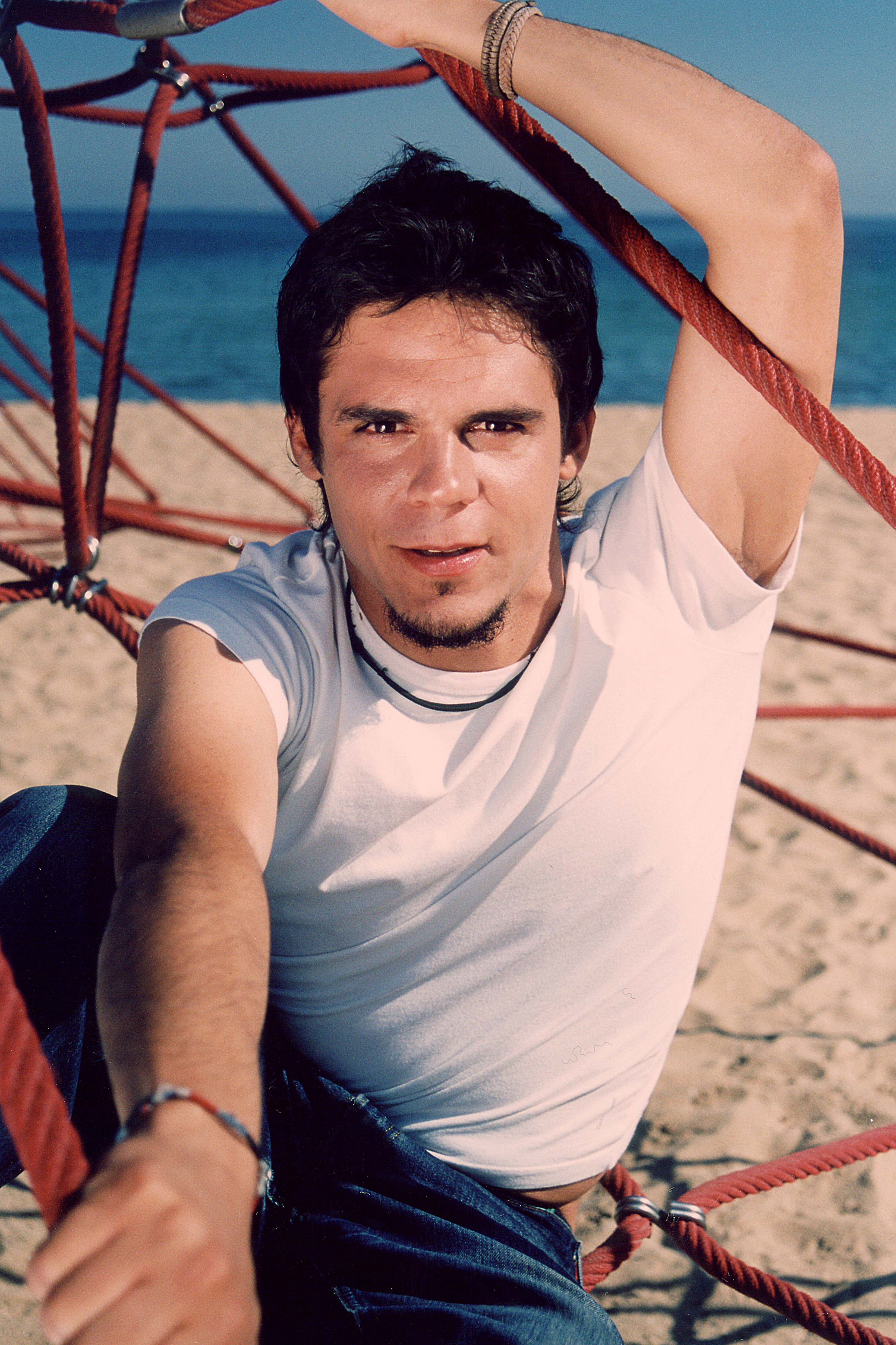 Bart Santana